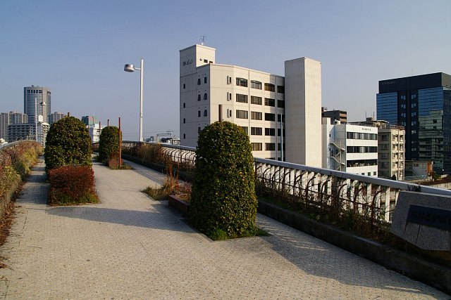 Osaka Bridge, Osaka City